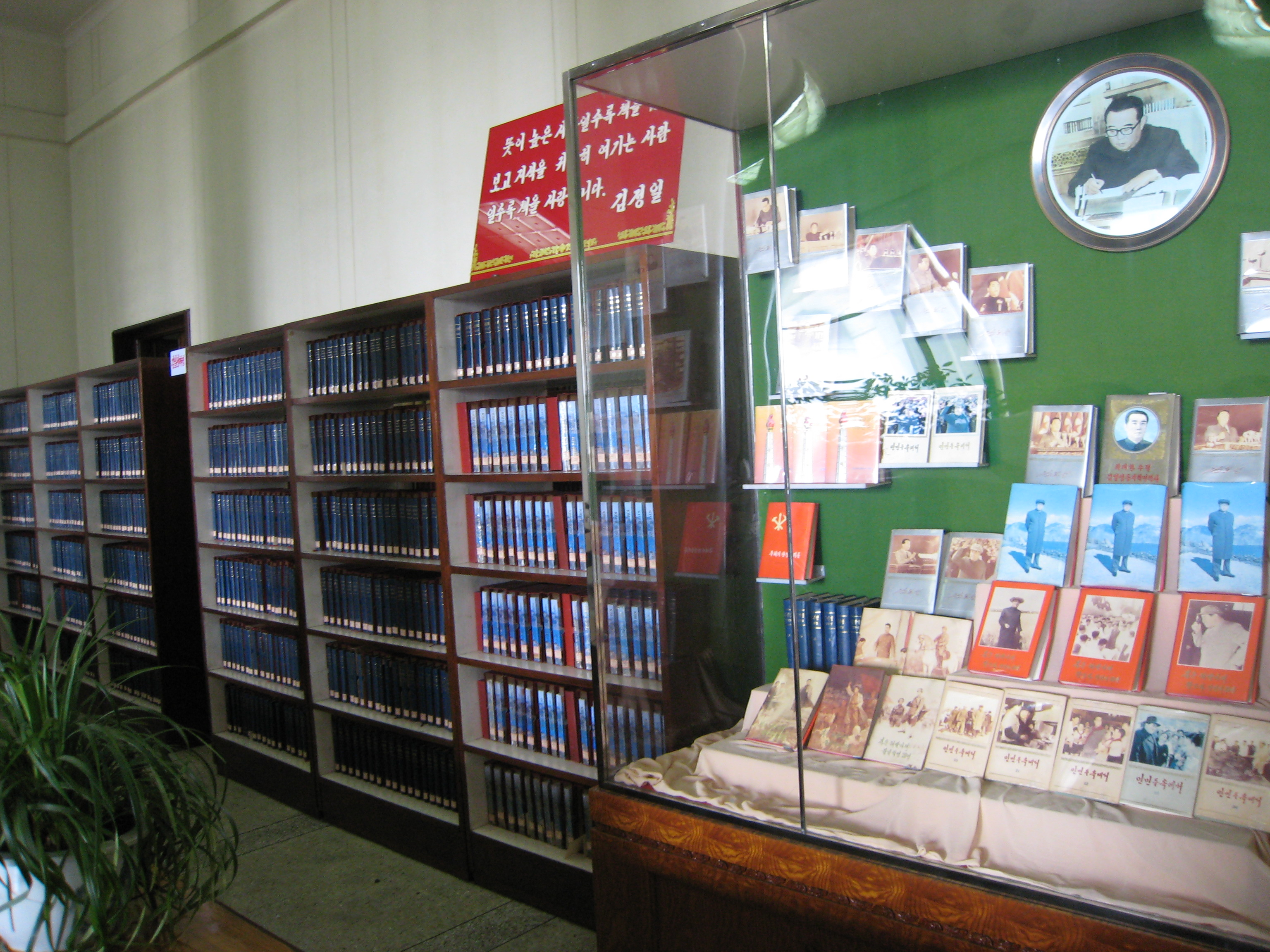 金氏家族的书籍典藏